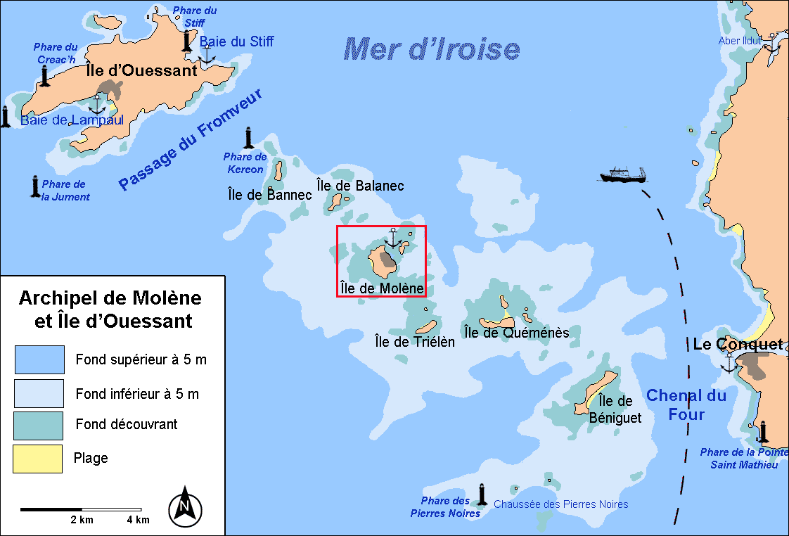 Description : Île d’Ouessant et archipel de Molène Place : Bretagne, France Date : Août 2006 Author : Réalisation Pline